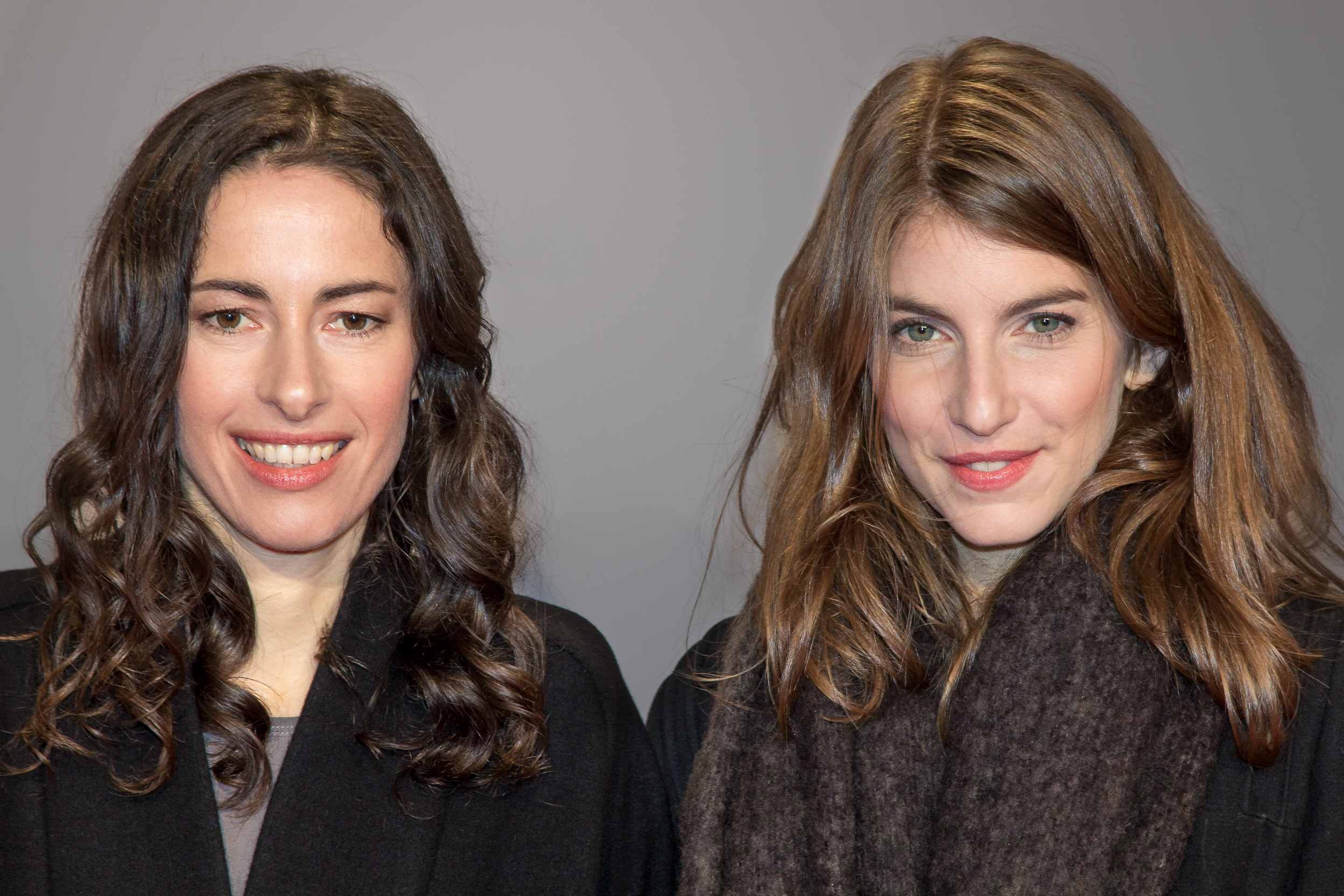 1liVE Krone 2015 - Boy